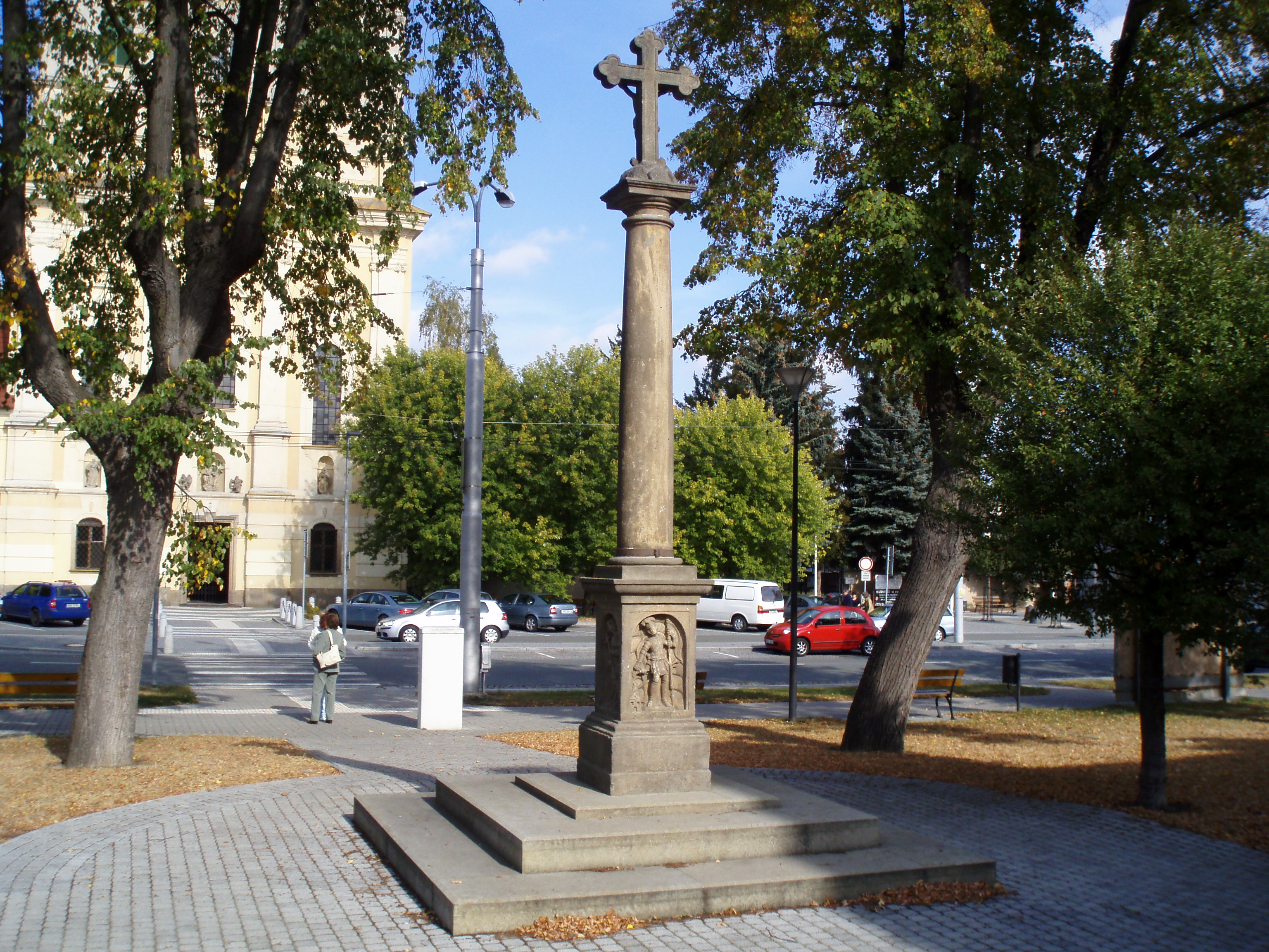 Kříž na Denisově náměstí